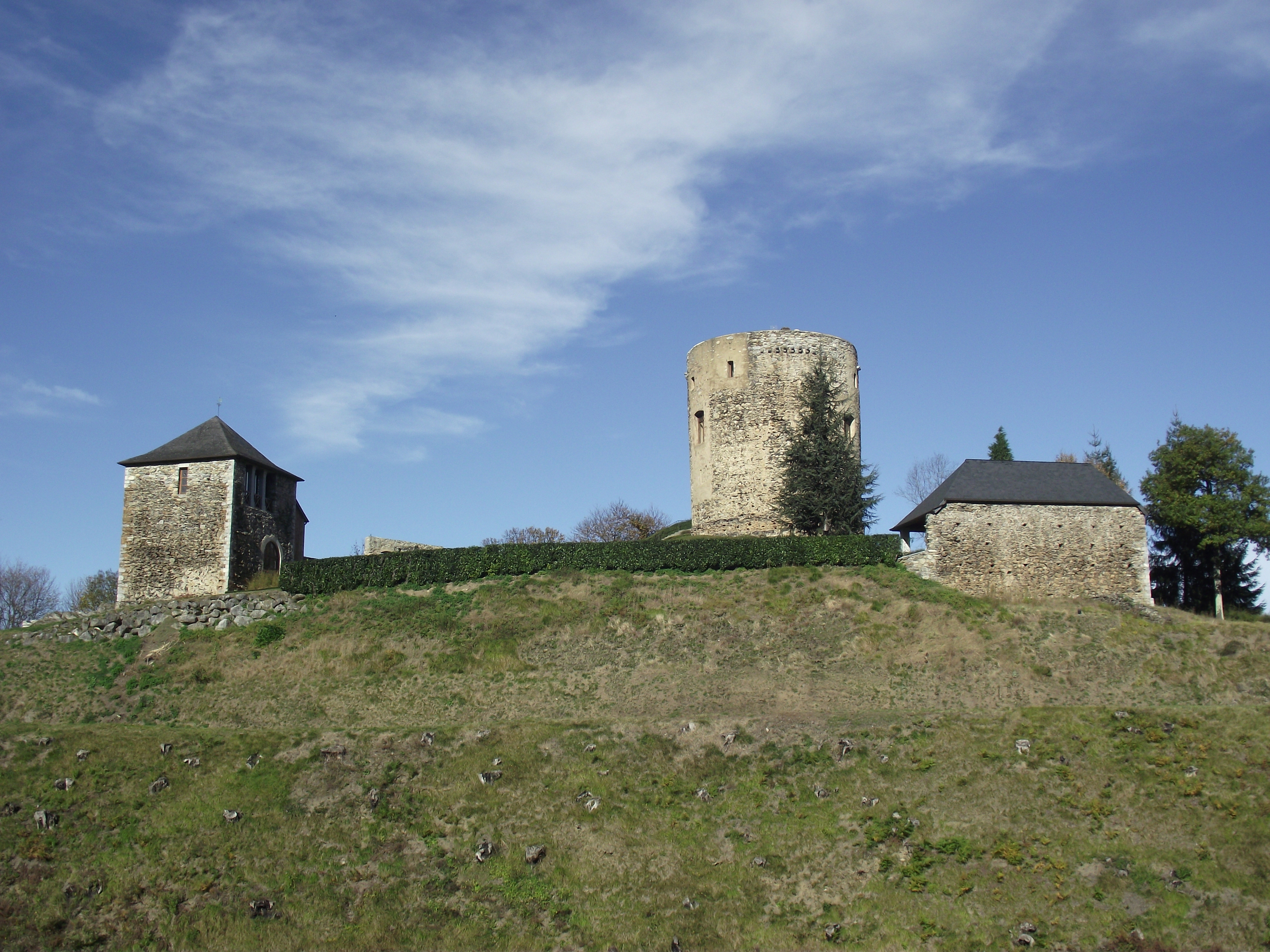 Château des Angles (Hautes-Pyrénées, France) devenu résidence privée et gîte